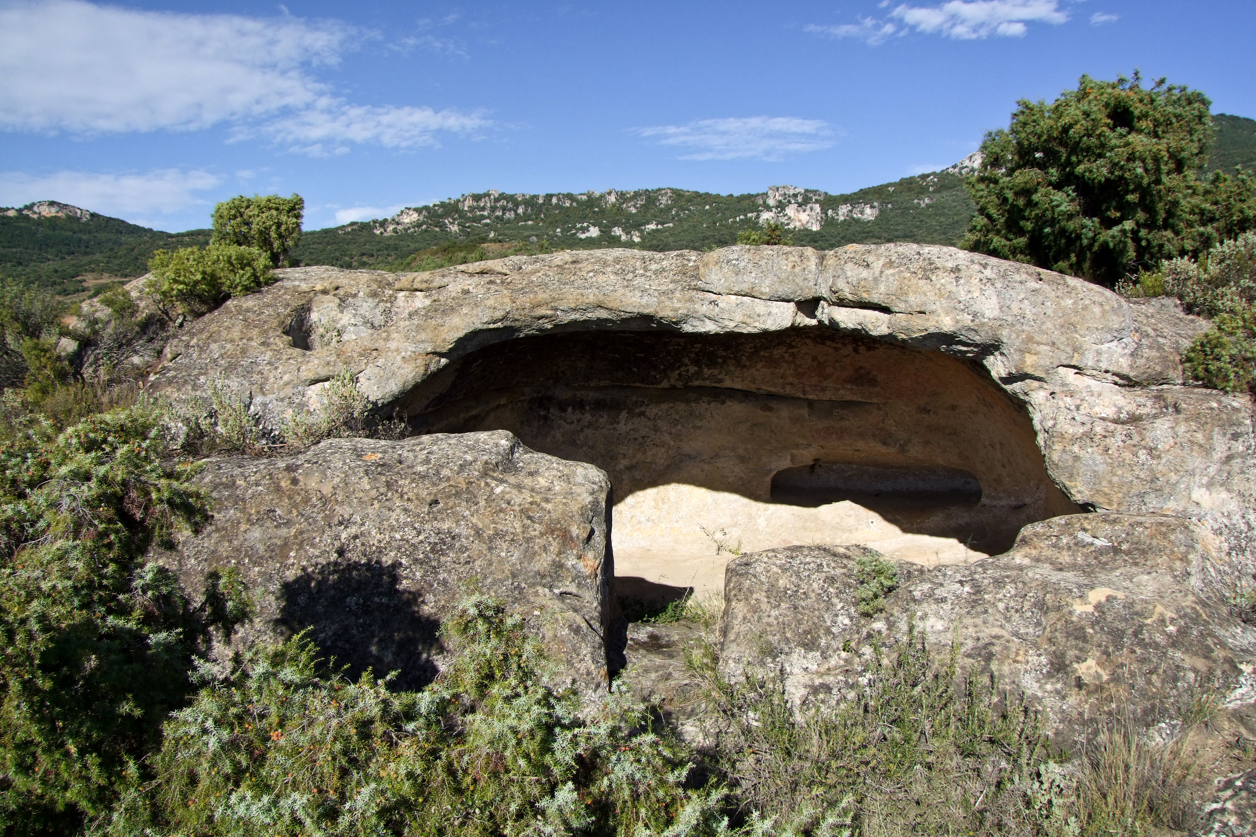 Eremitorio de Gobate en la localidad de Rivas de Tereso, La Rioja - España